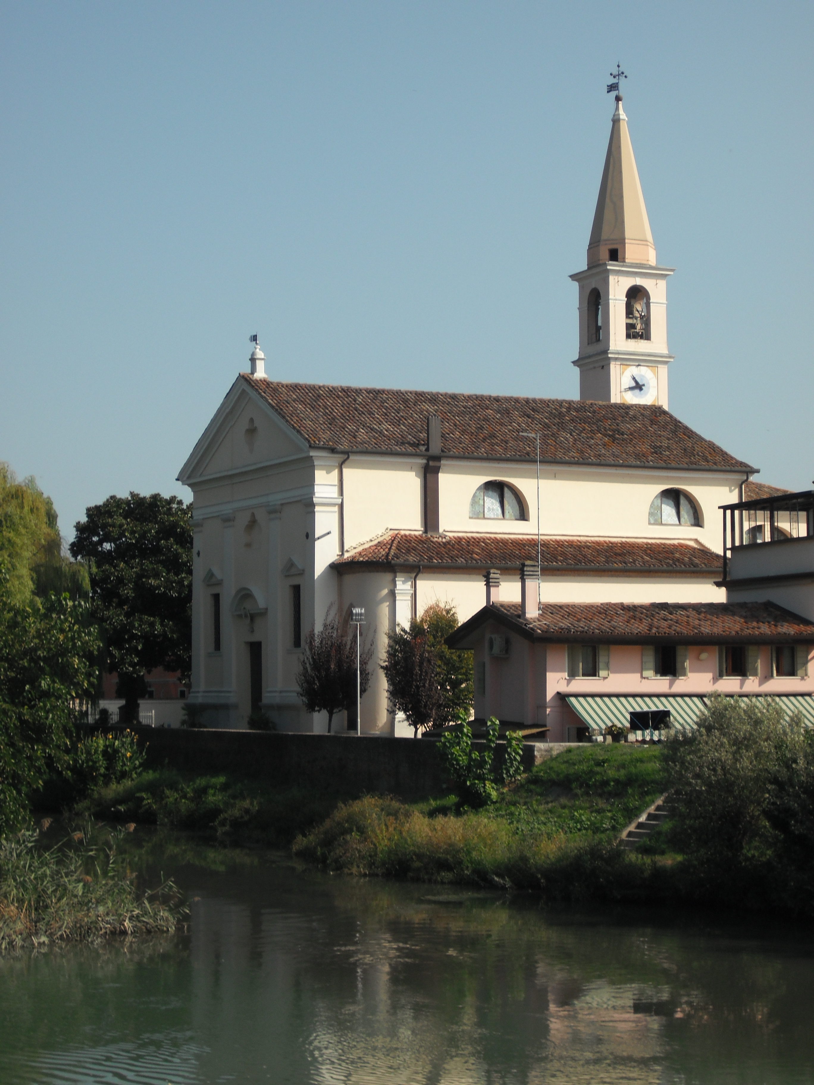 Chiesa di Musestre.